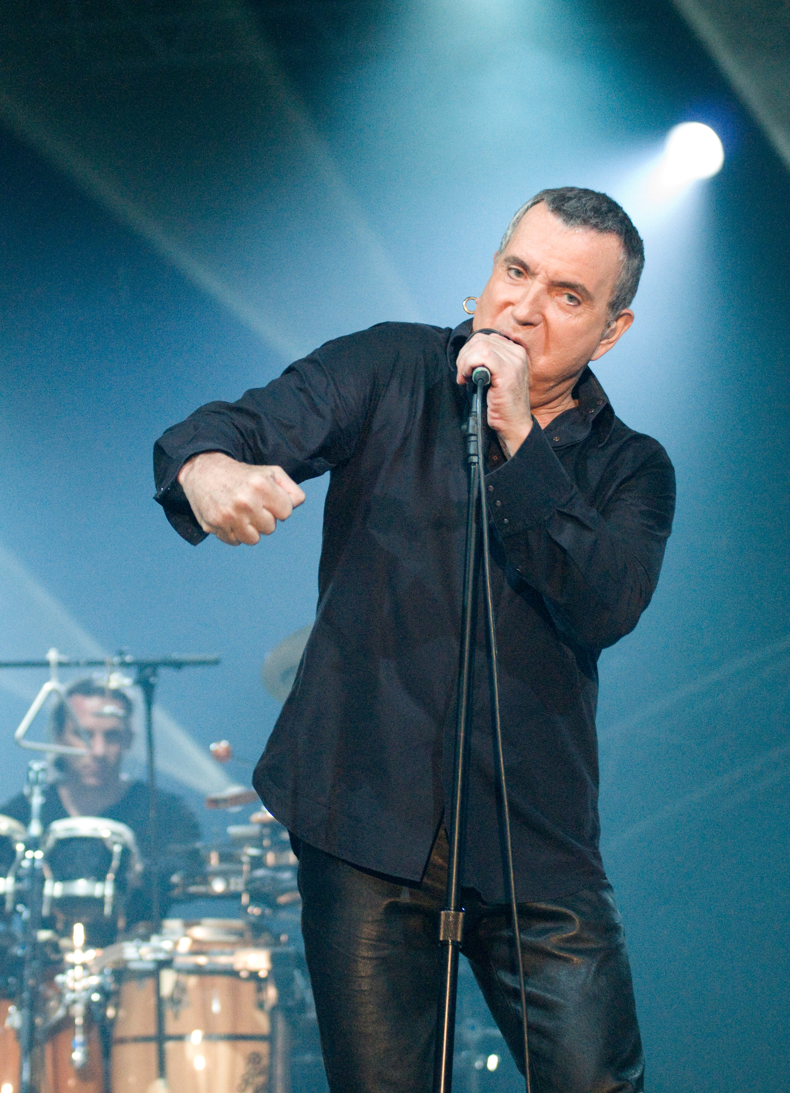 Bernard Lavilliers en concert le 26 avril 2008 à Auxerre